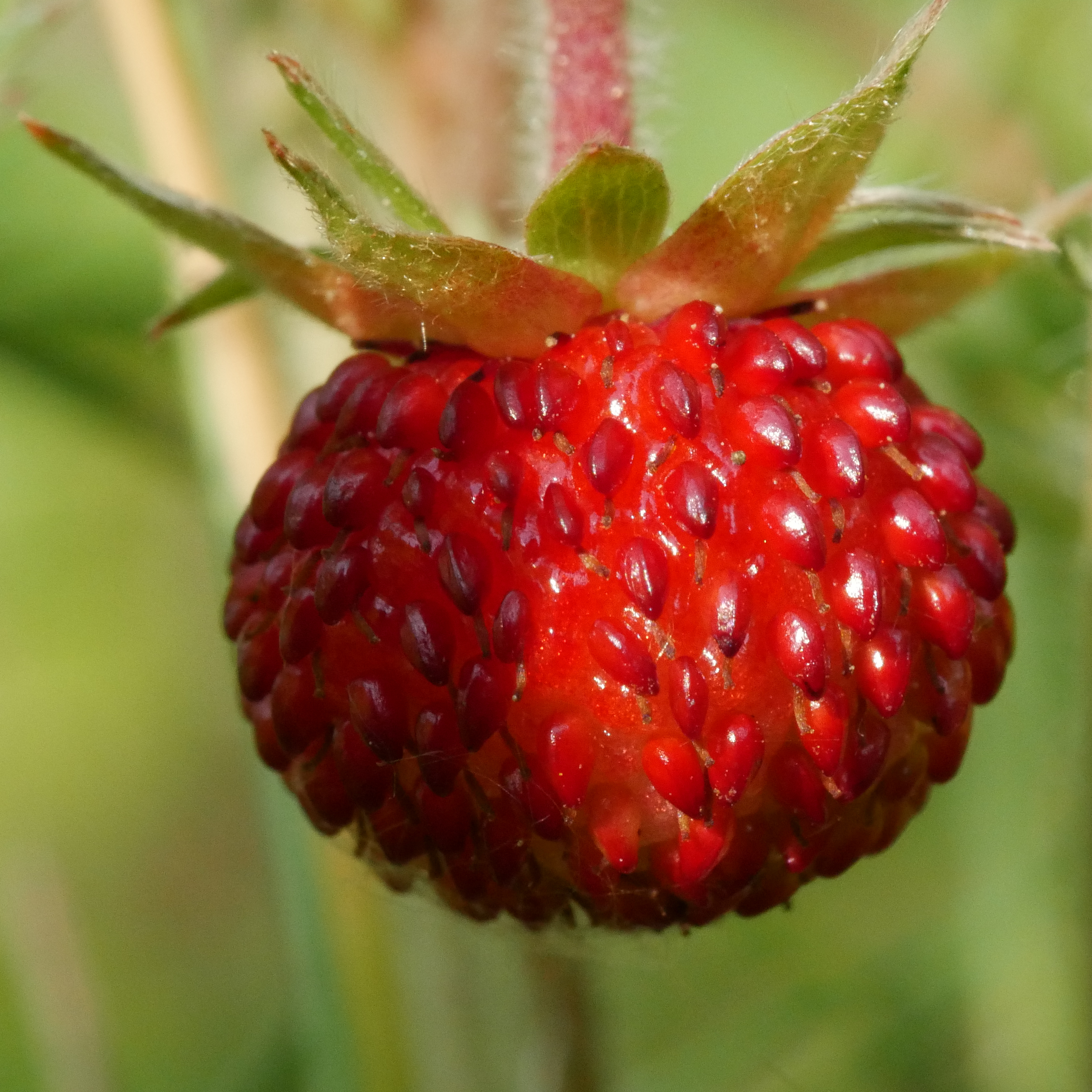 Walderdbeere (Fragaria vesca) im Freilichtmuseum Roscheider Hof. Standort: Neben dem Weg unter den Strächern unterhalb des Rosengartens. Im Freigelände des Museum an vergleichbaren Standorten stark verbreitet.